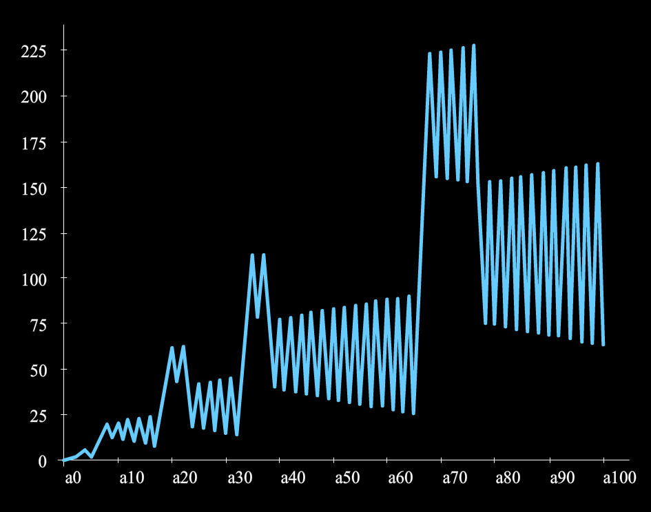 Grafik nilai 100 suku pertama dalam barisan Recamán